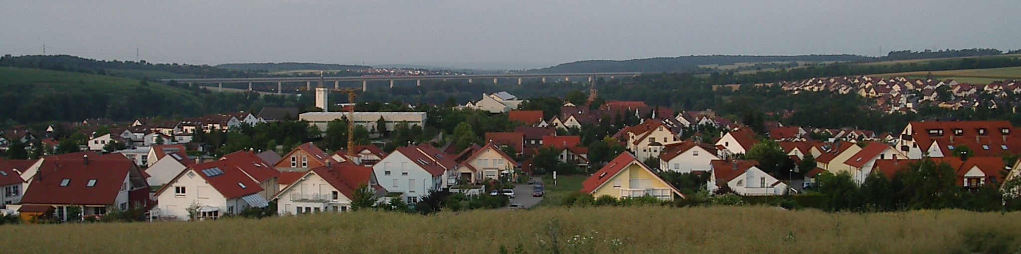 Blick über Enzweihingen zur Bahnbrücke